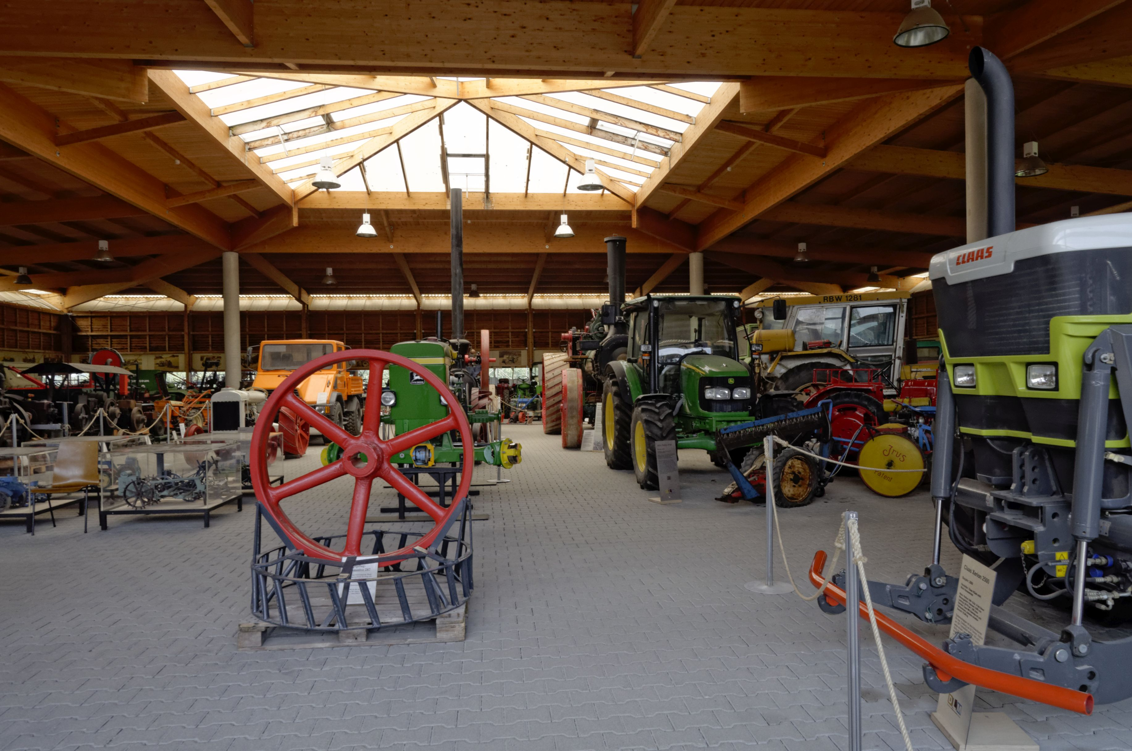 Bilder aus dem Deutsches Landwirtschaftsmuseum in Hohenheim (Stuttgart)